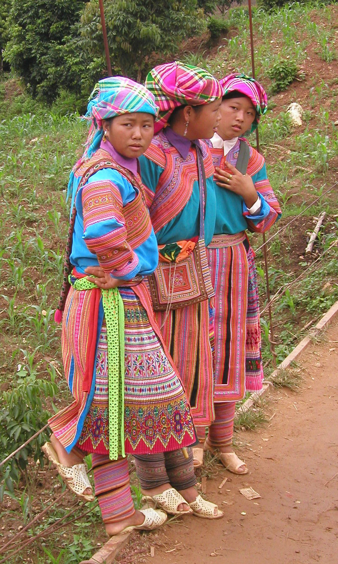 Taken at Coc Ly market, Sapa, Vietnam 2004